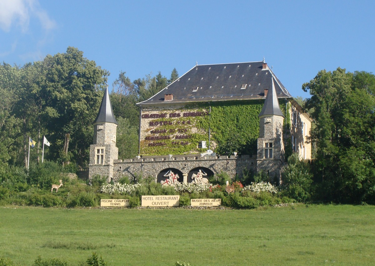 Le château des Herbeys, époque Renaissance, aujourd'hui hôtel de luxe, commune de Chauffayer (Hautes-Alpes).